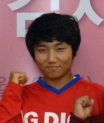 LG전자는 지난 5일 관악구 남현동에 위치한 상록보육원을 찾아 'LG 디오스 김치냉장고와 함께하는 사랑의 김치 나누기’행사를 가졌다. LG 김치냉장고 모델로 활동하고 있는 차두리, 기성용, 여민지 선수와 LG전자 자원봉사자들이 함께 보육원에 전달할 김장김치를 담고 있다.